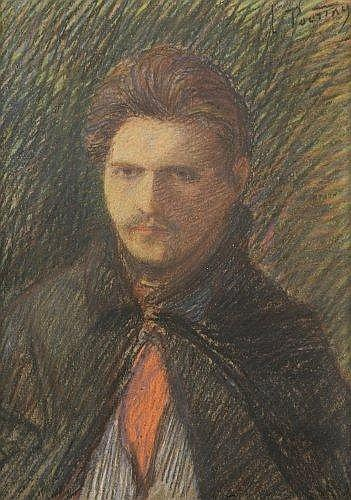 Autoportrait